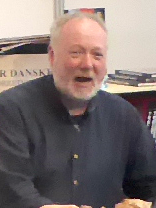 Jakob Stegelmann ved Copenhagen Comics 2017 i Øksnehallen i København.